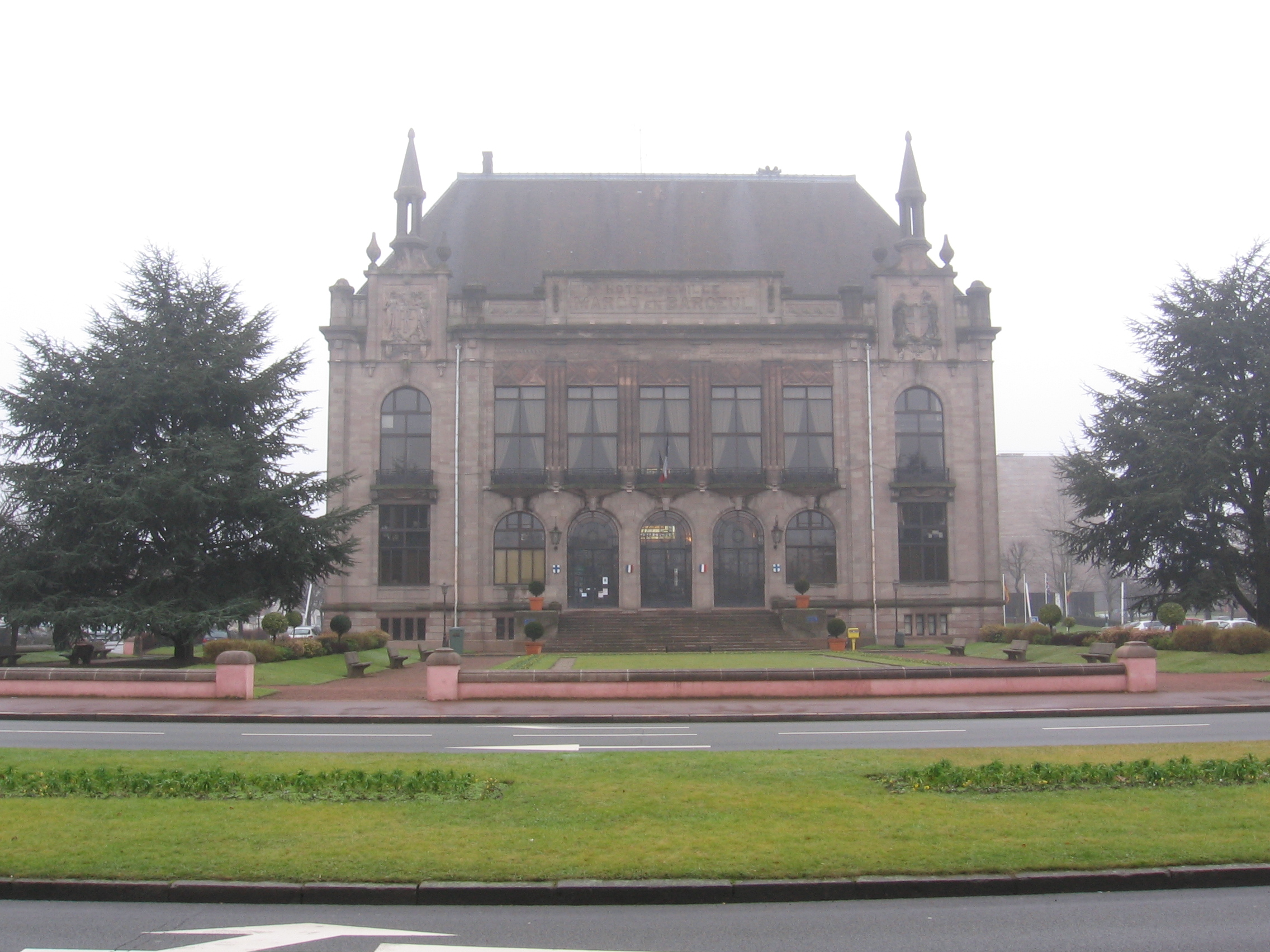 Mairie de Marcq-en-Baroeul (59700) Février 2006 Photographie personnelle